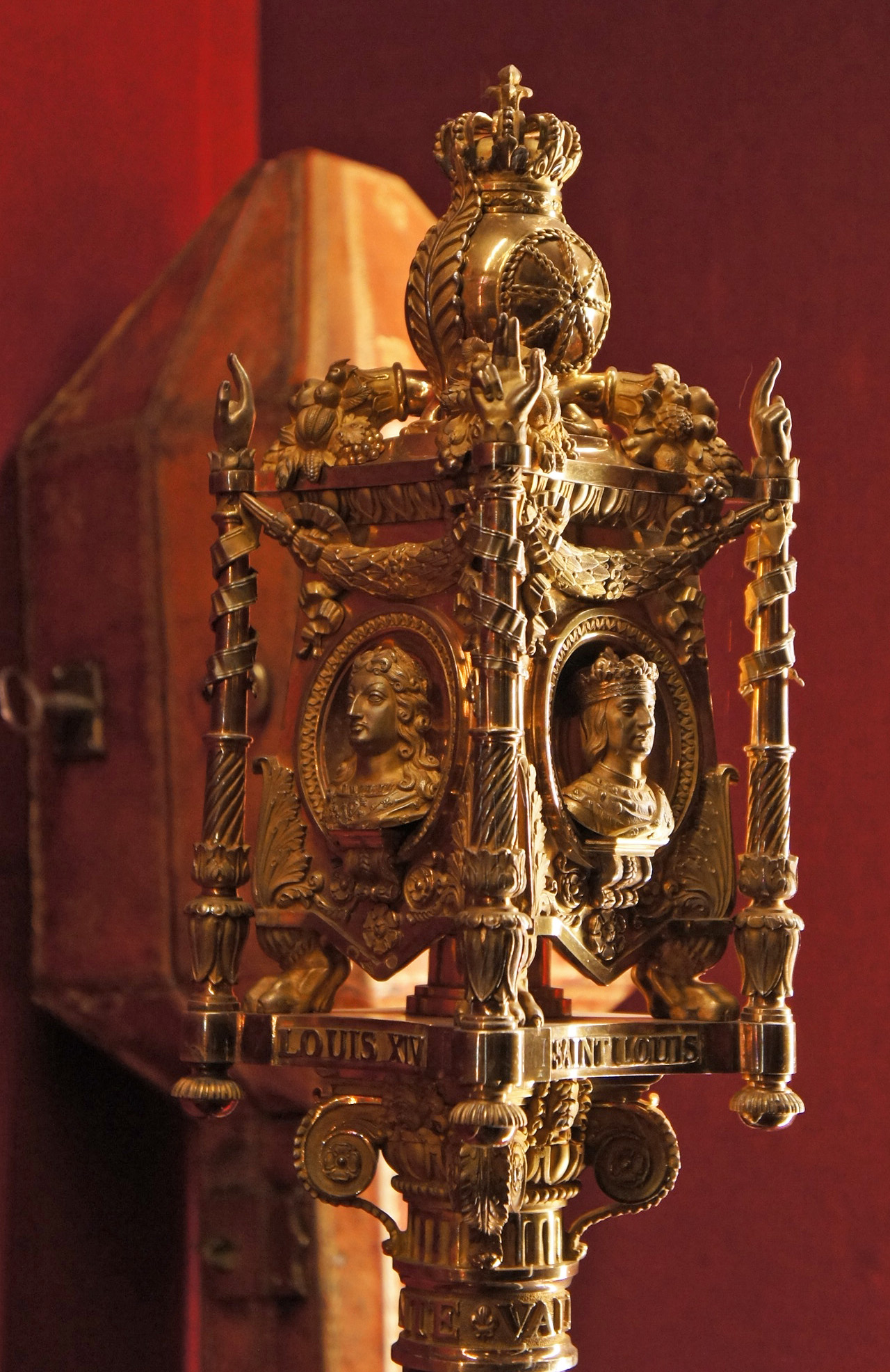 Masse de chancelier, figure de Louis XIV, de saint-Louis au Palais du Tau.